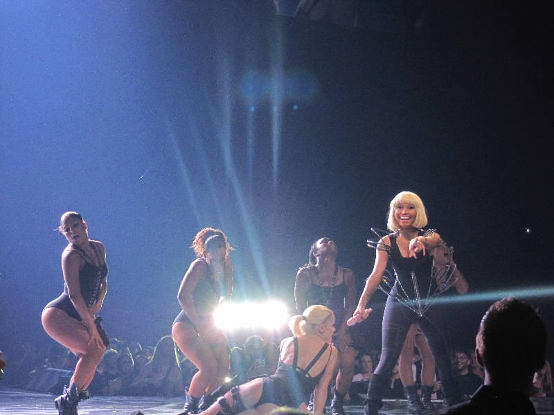 Nicki Minaj en el FFT.